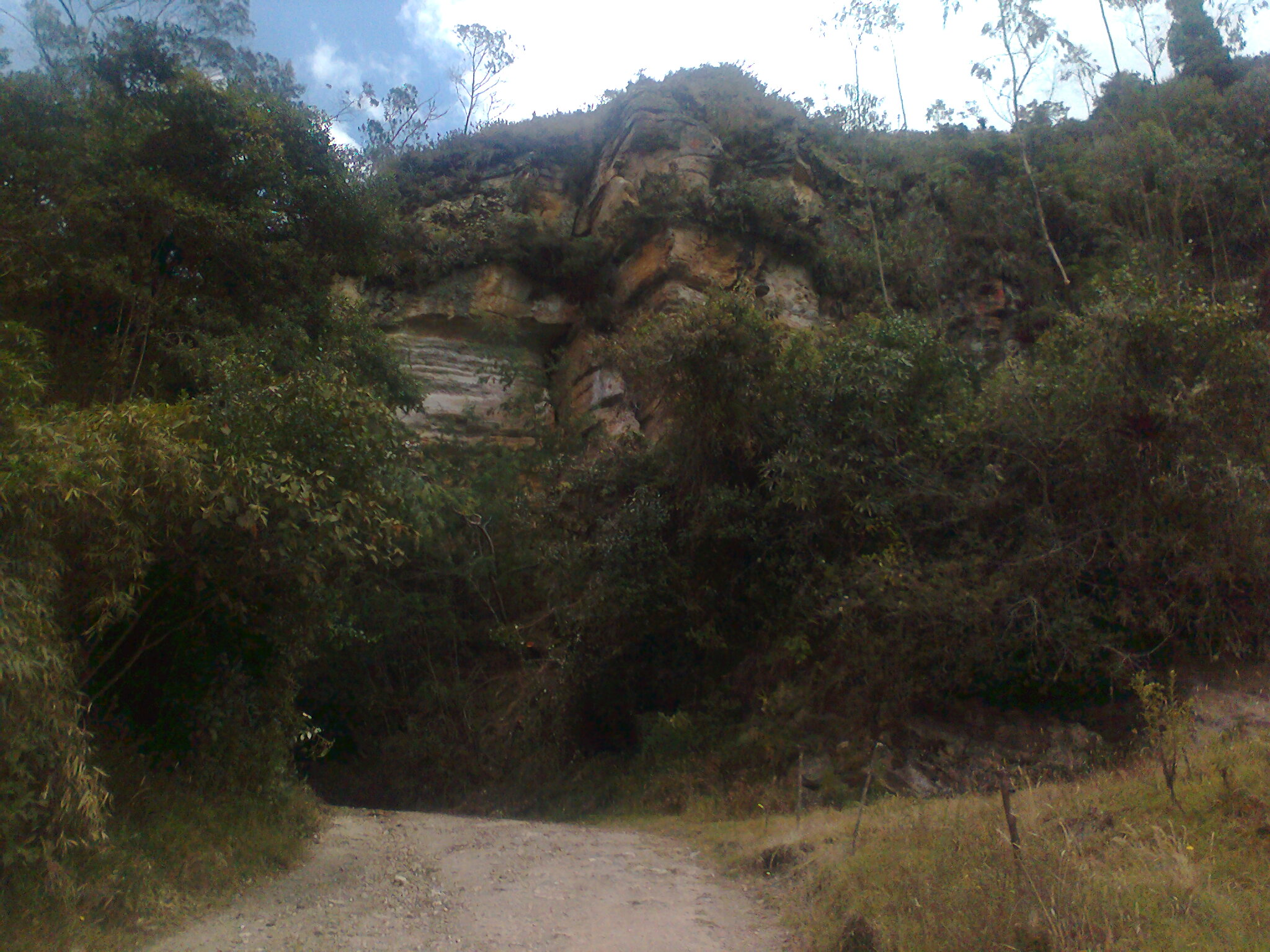 Antiguo camino rural, transitado durante siglos para ir del campo a la cuidad, en Viracachá Boyacá. Esta fotografía fue tomada en el municipio colombiano con código 15879.